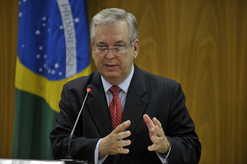 Luiz Alberto Figueiredo em 19 de setembro de 2012.